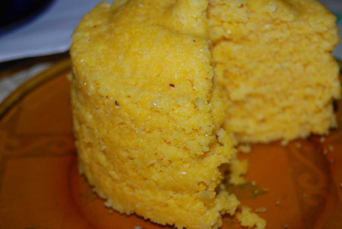 Um típico bolo de cuscuz servido no café-da-manhã na Região Nordeste do Brasil.